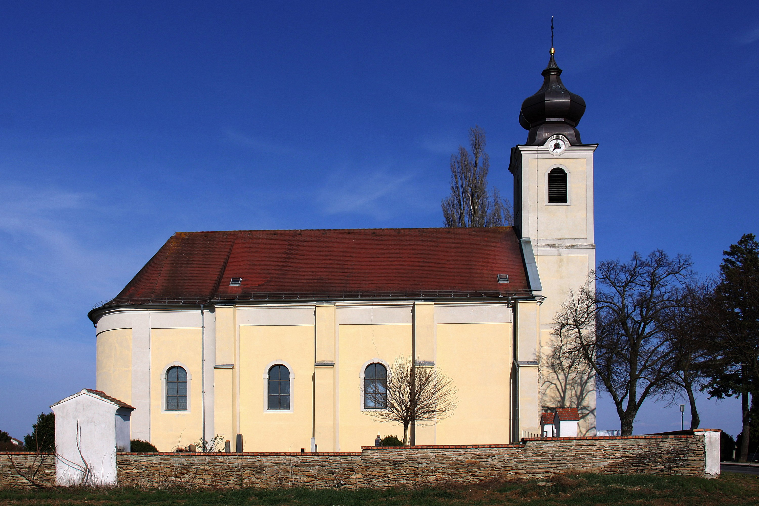 Markt Neuhodis - Pfarr- und Wallfahrtskirche Mariä Himmelfahrt in Dürnbach Object location47° 16′ 08.57″ N, 16° 23′ 30.31″ E